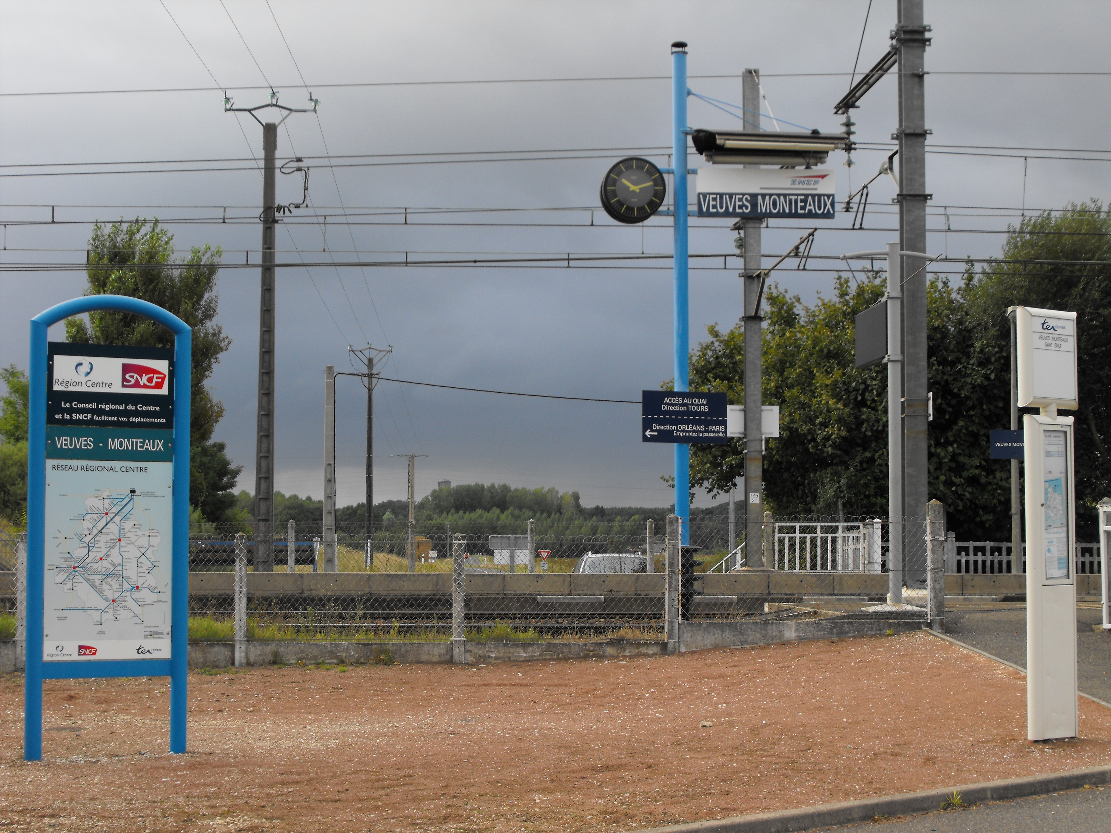 Gare SNCF de Veuves-Monteaux, Loir-et-Cher, France